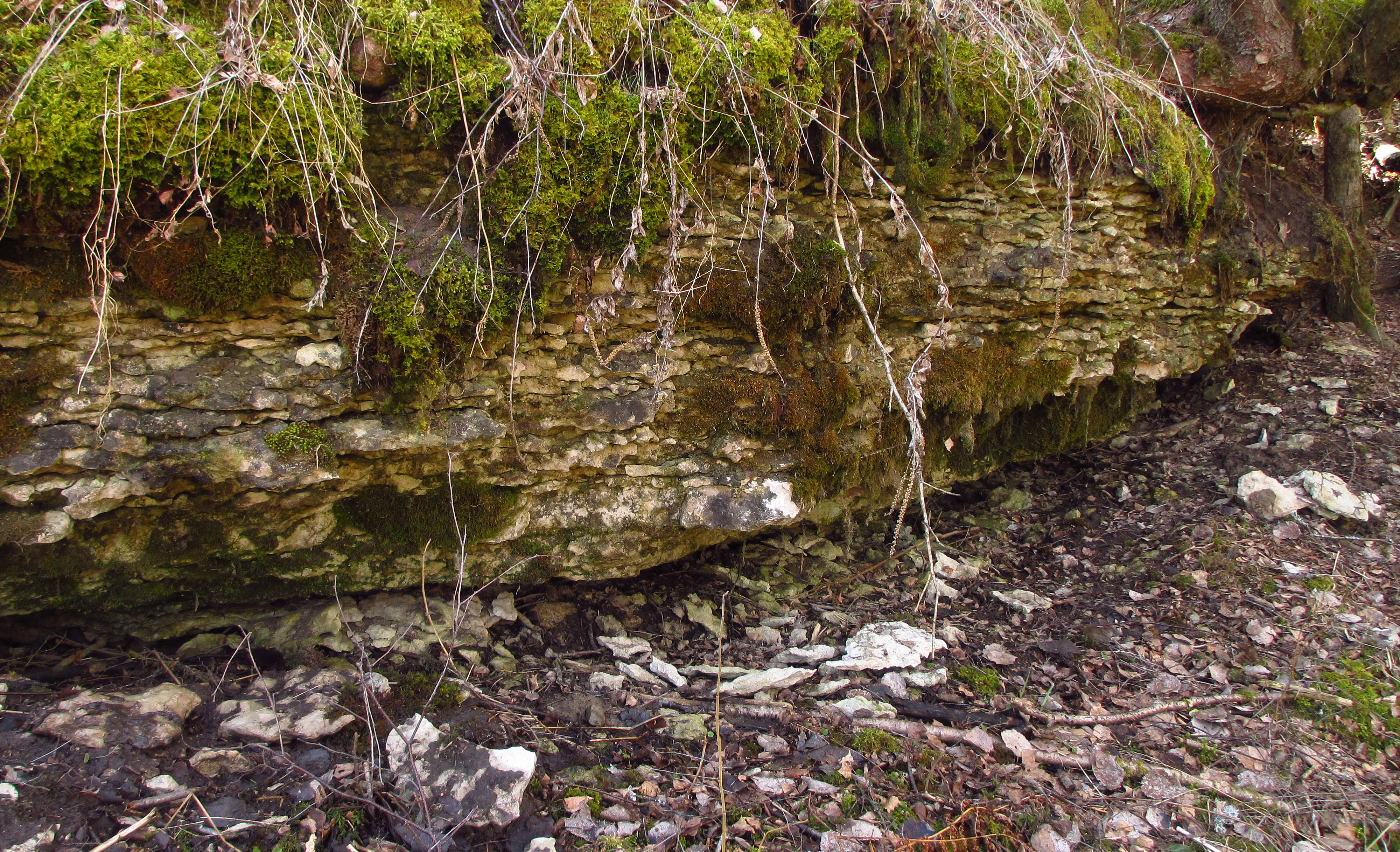 Urge kuristik